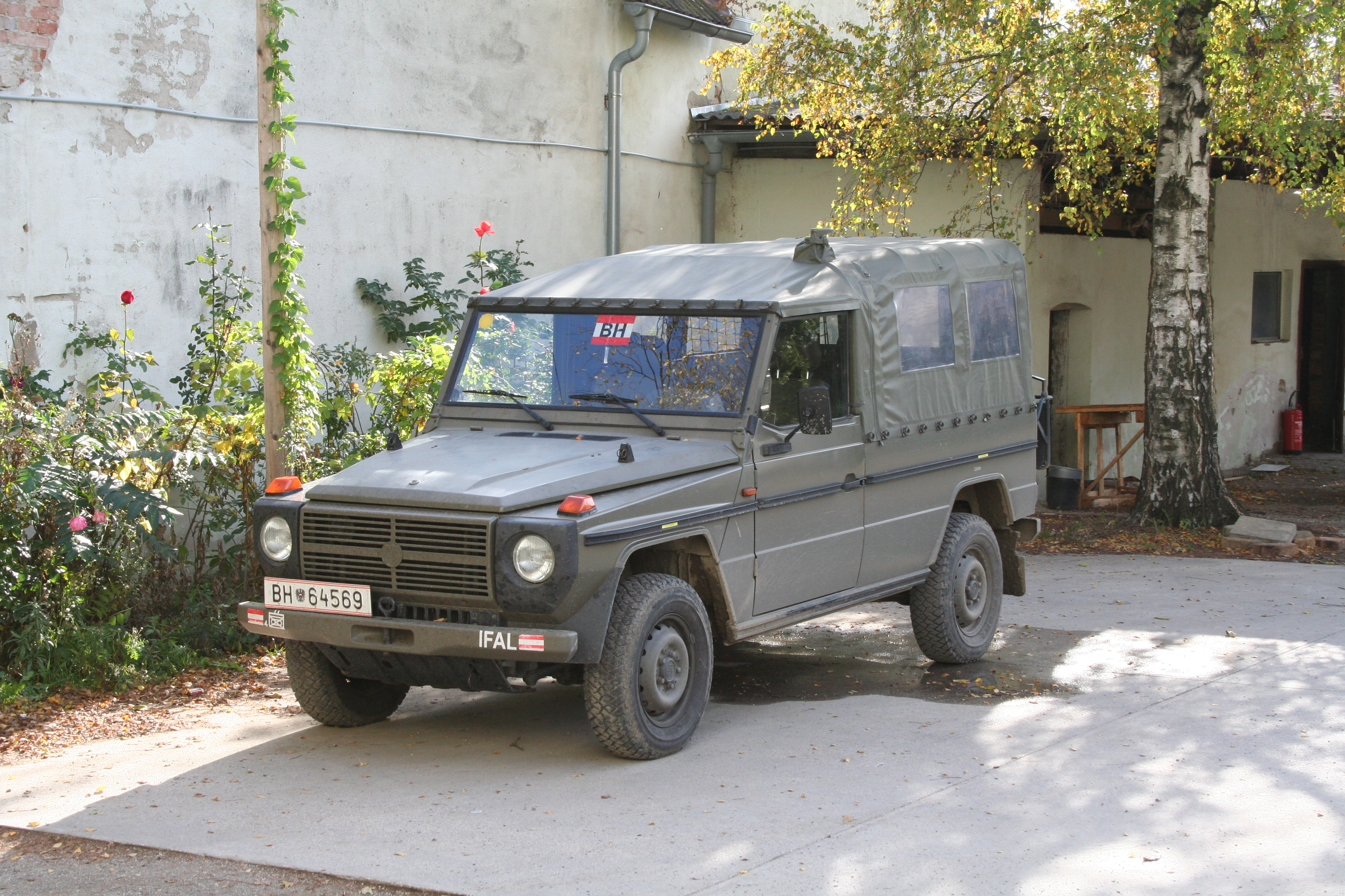 Puch G d. österr. Bundesheers